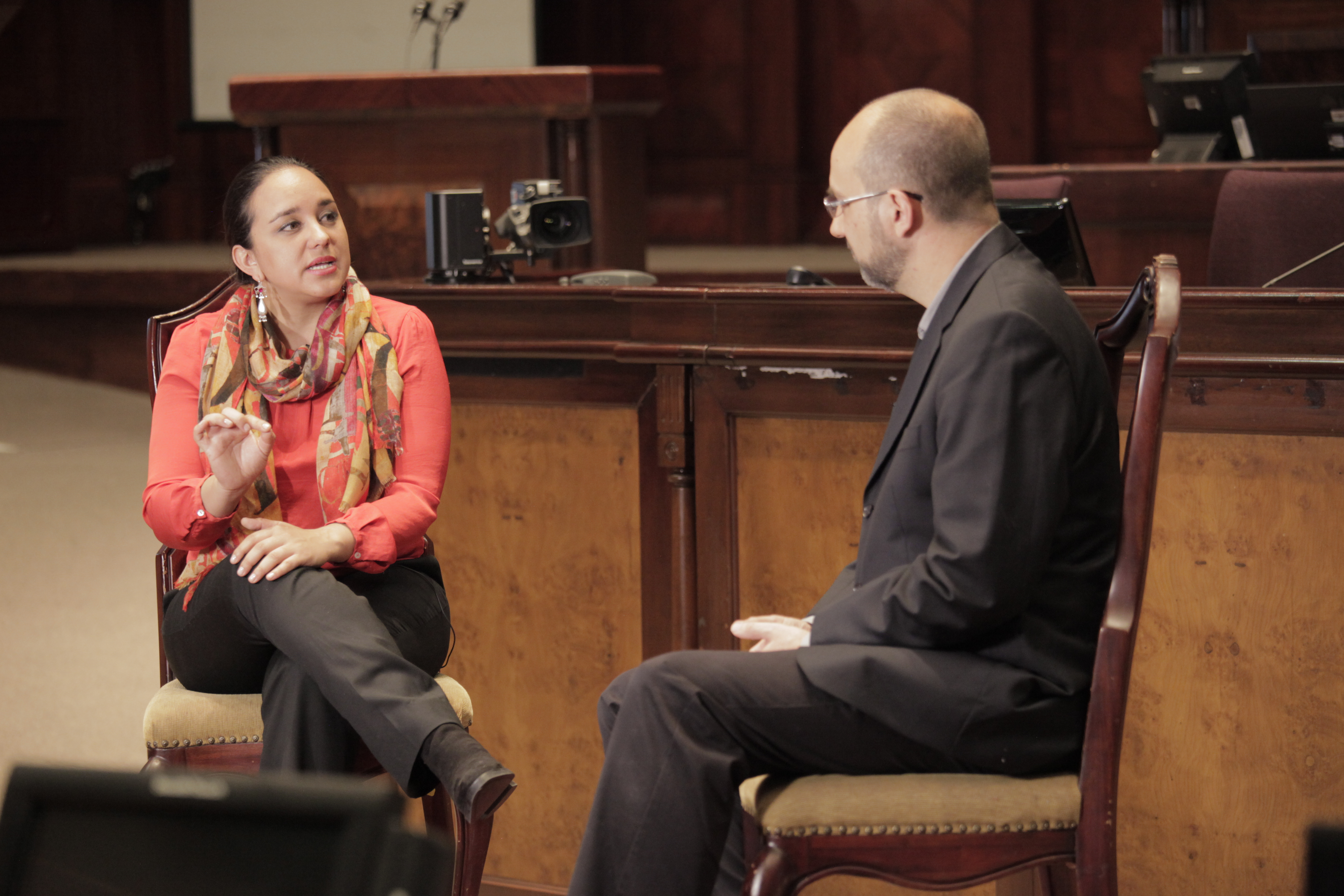 Tema: Gregory Wilpert reportero de la cadena TeleSur entrevista a la presidenta de la Asamblea Nacional: Gabriela Rivadeneira sobre la Ley de Alianzas público-privadas. Fotografía: Alberto Romo/Asamblea Nacional